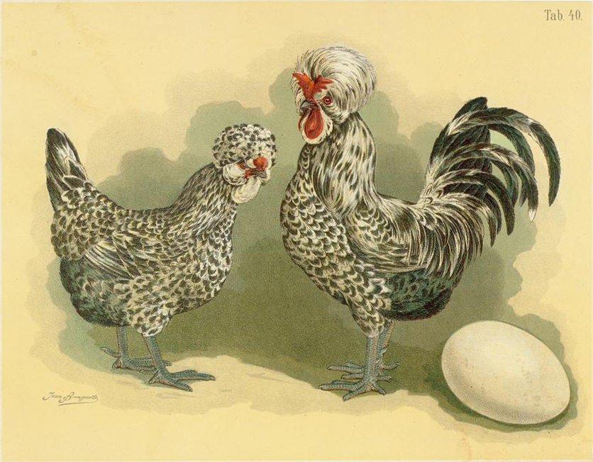 Houdan-Huhn. Gallus dom. barbato cristatus phyllolophus. Houdan's. Houdan.